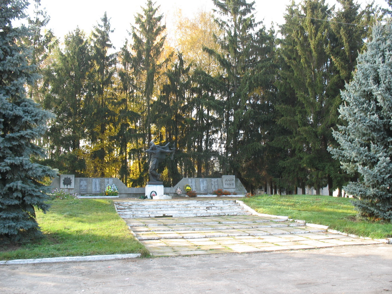 Україна, Чернігівська обл., Менський р-н, с. Киселівка. Меморіал воїнам-визволителям у Другій світовій війні